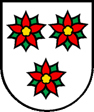 Wappen von Arosio, Kanton Tessin, Schweiz